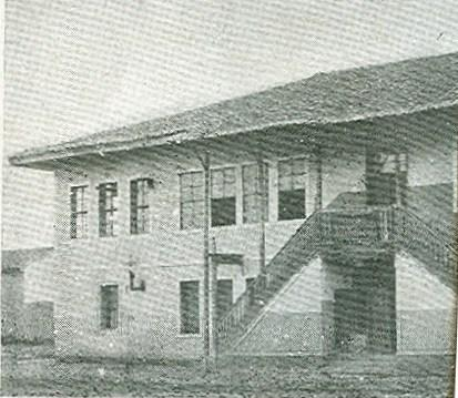 Skopie bulgarian school